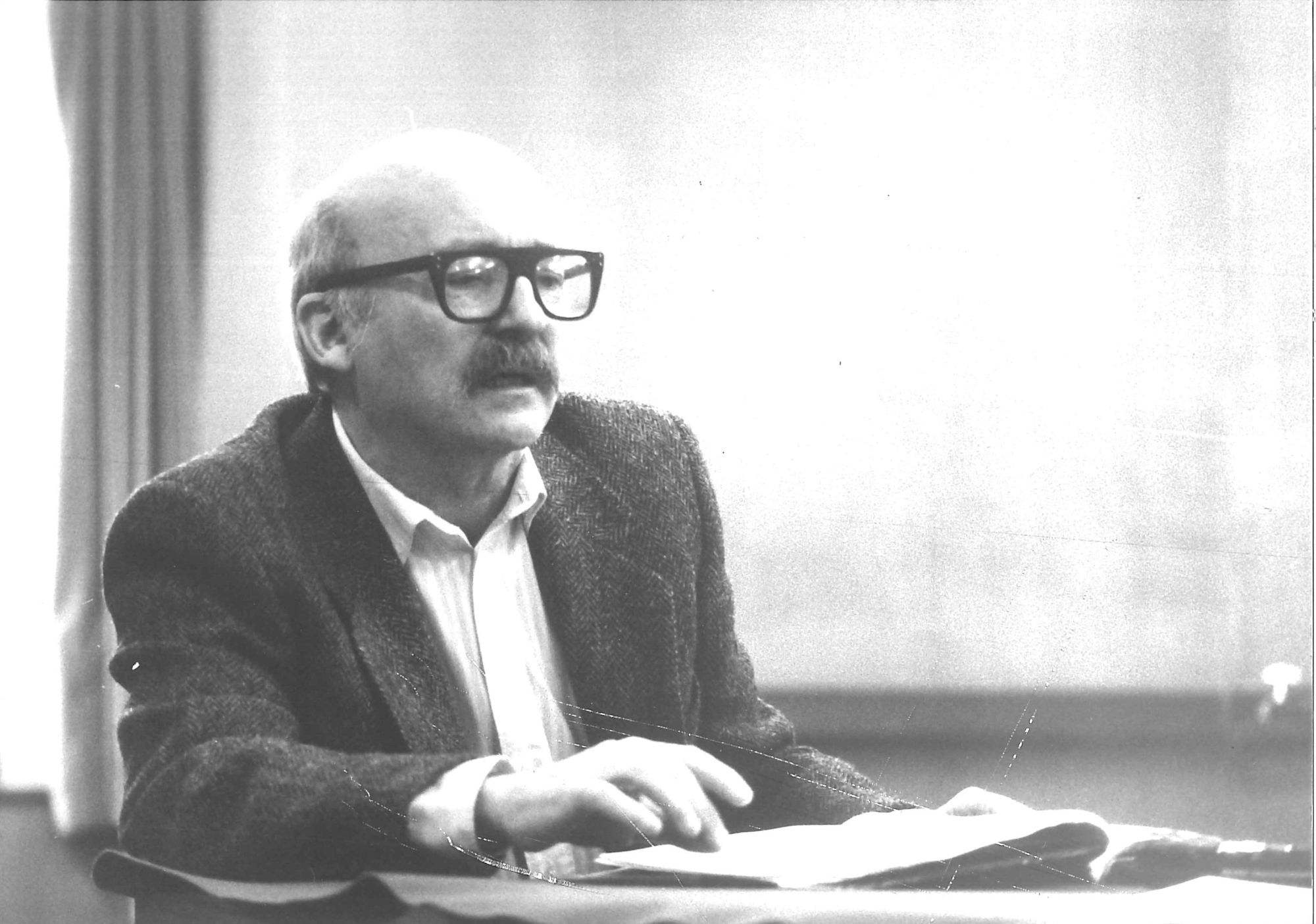 Der Schauspieler und Regisseur Peter Groeger im Hörspielstudio - ein Porträt des Berliner Fotografen Werner Bethsold.